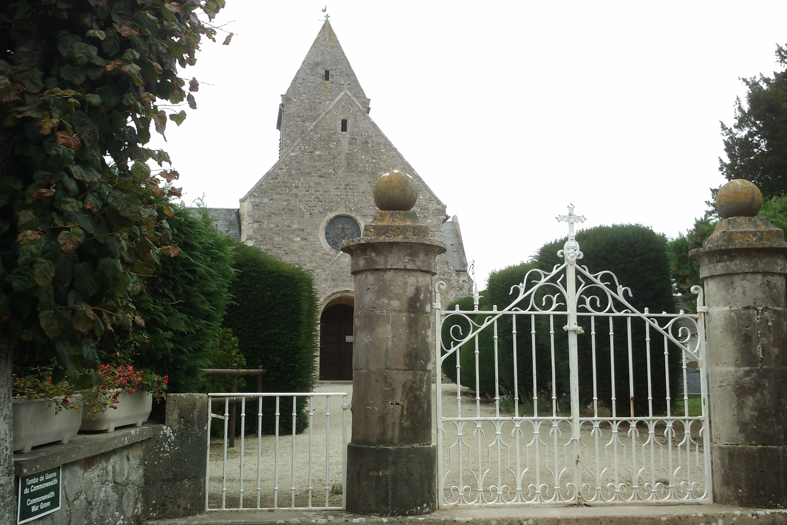 Église Saint-Martin de Brévands